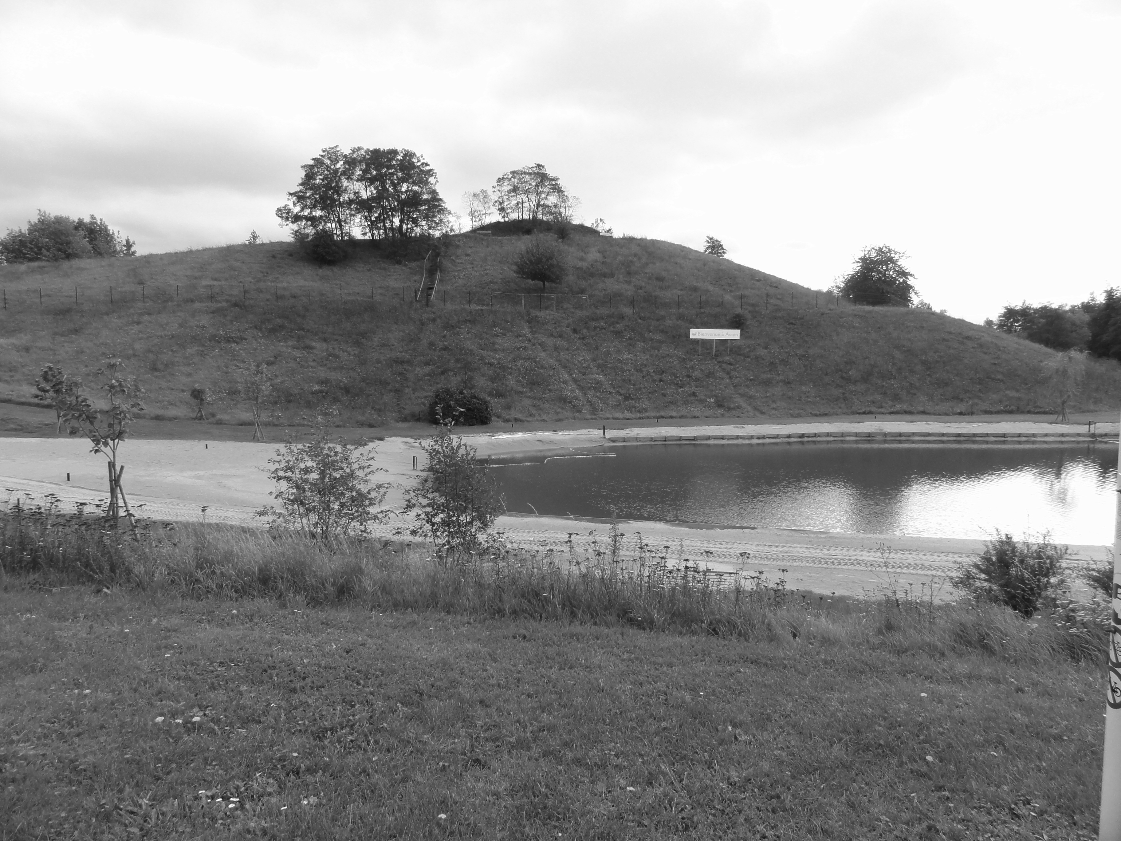 Terril n° 81 dit 5 de Lens Est, Fosse n° 5 - 5 bis de la Compagnie des mines de Lens, Avion, Pas-de-Calais, Nord-Pas-de-Calais, France.